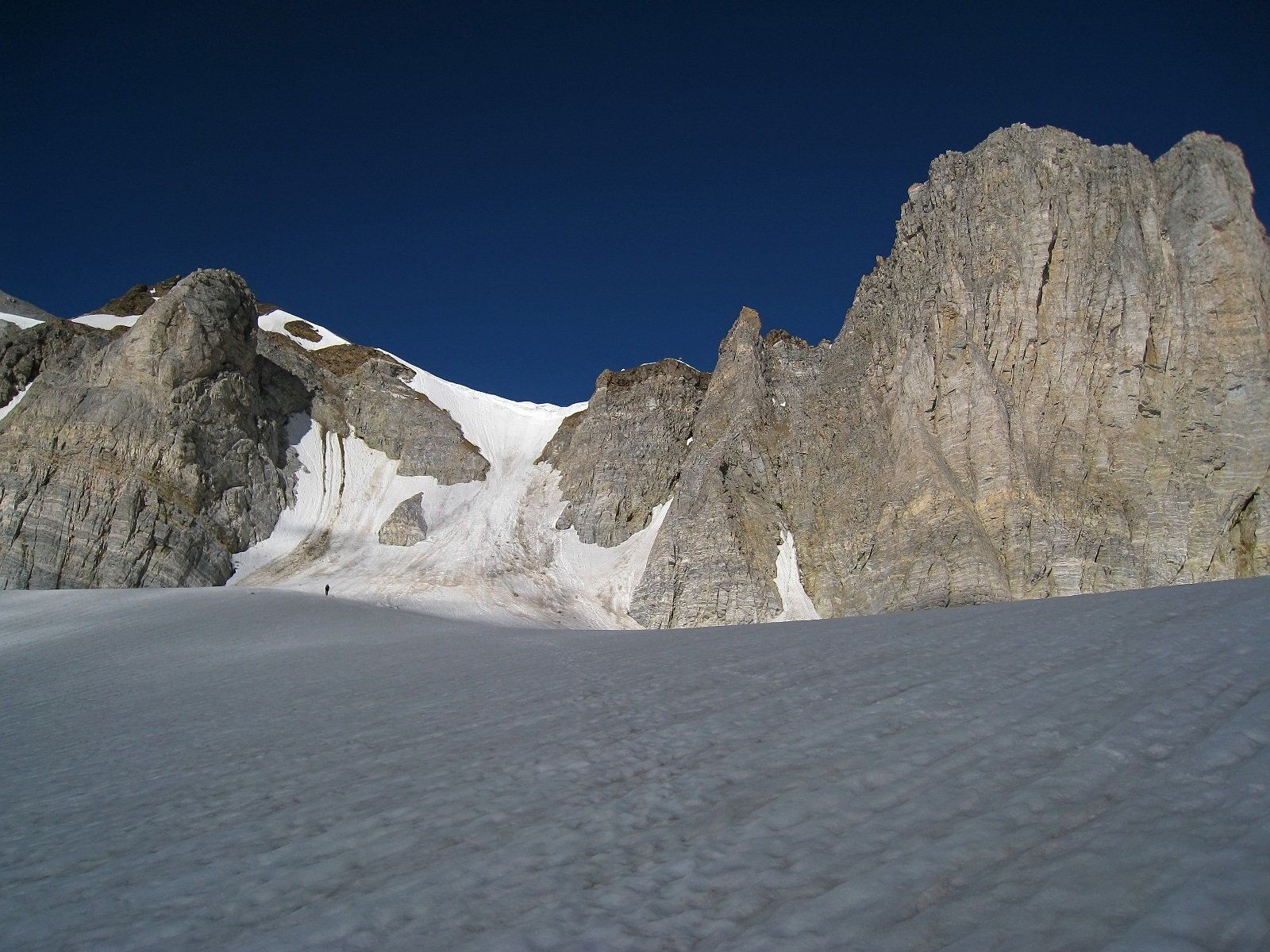 Schölligletscher